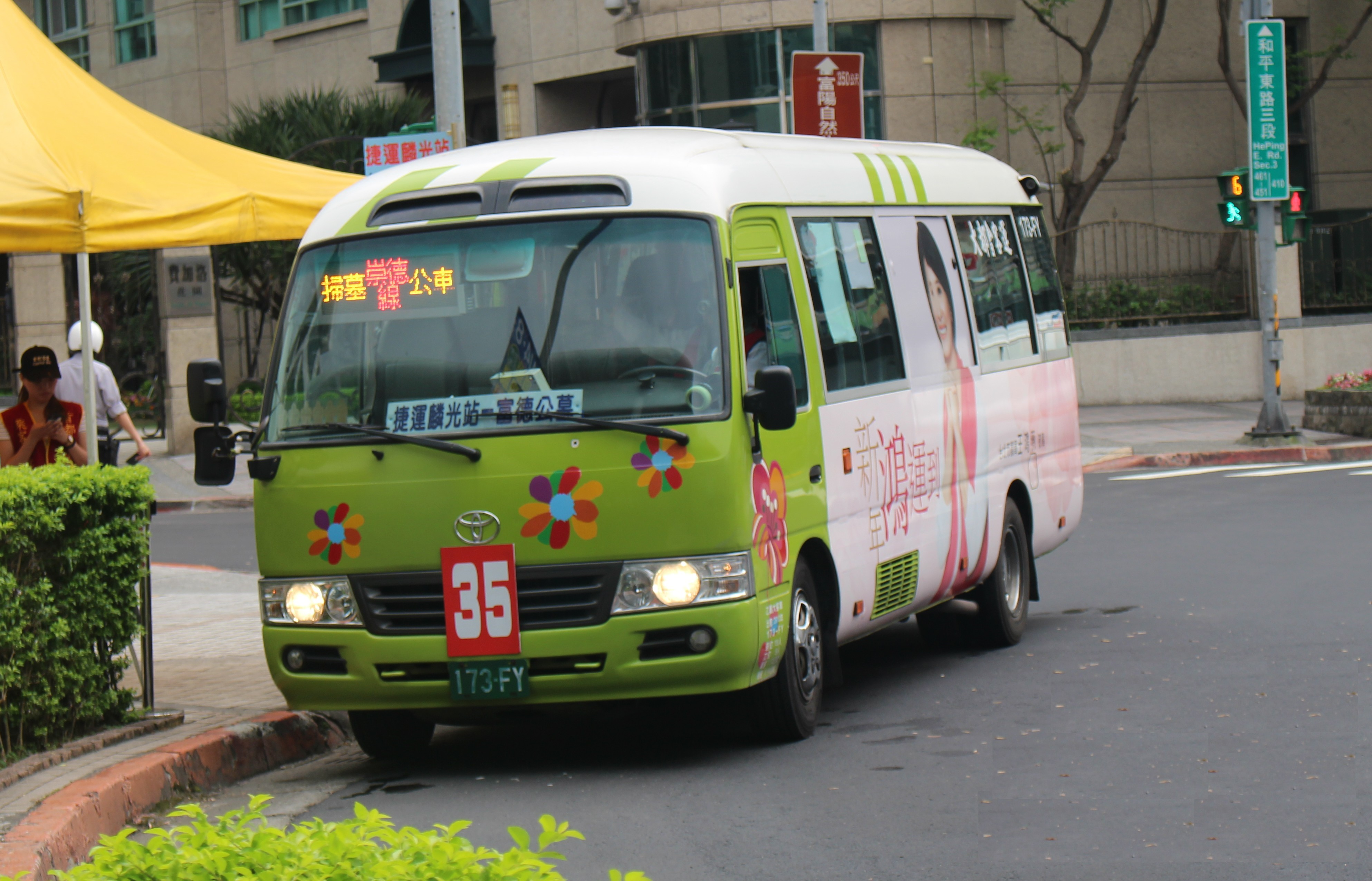 中文（台灣）: 大都會客運 2012 TOYOTA COASTER XZB50L-ZEMSYR 173-FY 掃墓公車崇德線